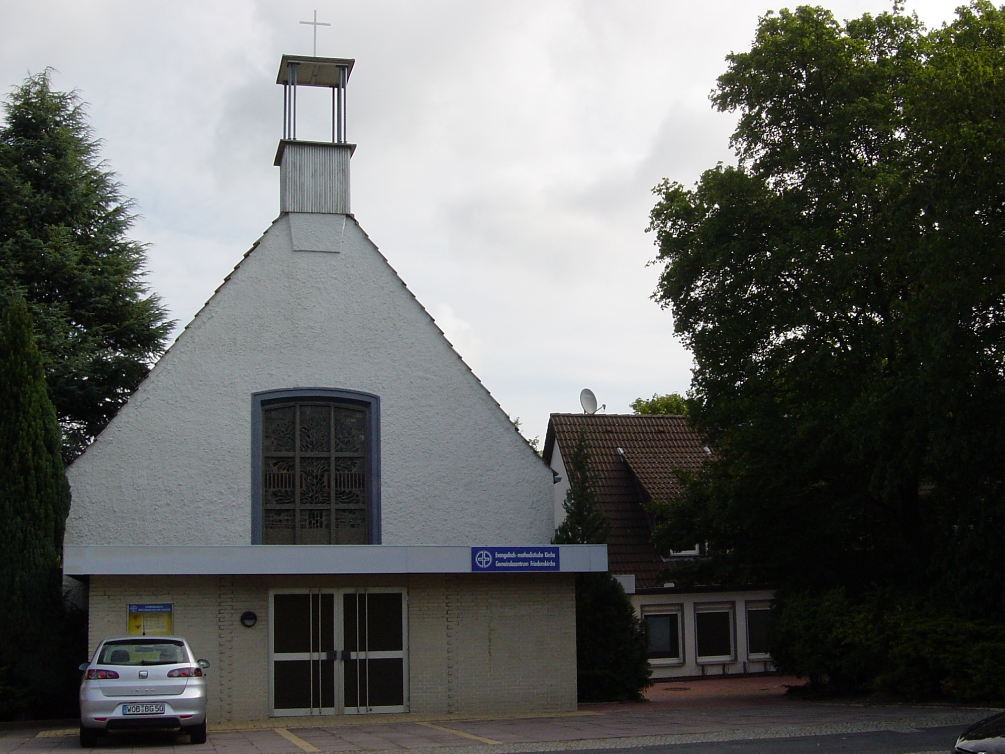 Evangelisch-methodistische Friedenskirche, Heinrich-Heine-Str. 45a, 38440 Wolfsburg